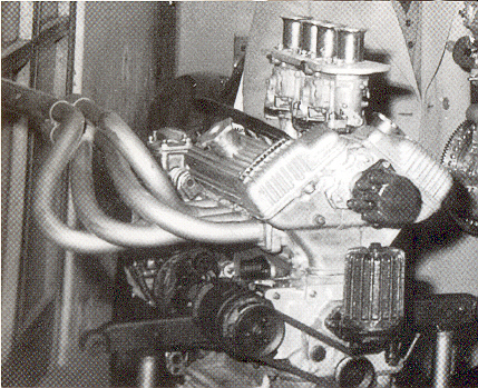 Motore Bandini 1000 a carburatori Verticali. Foto tratta dal libro Bandini (storia e automobili di Ilario Bandini)